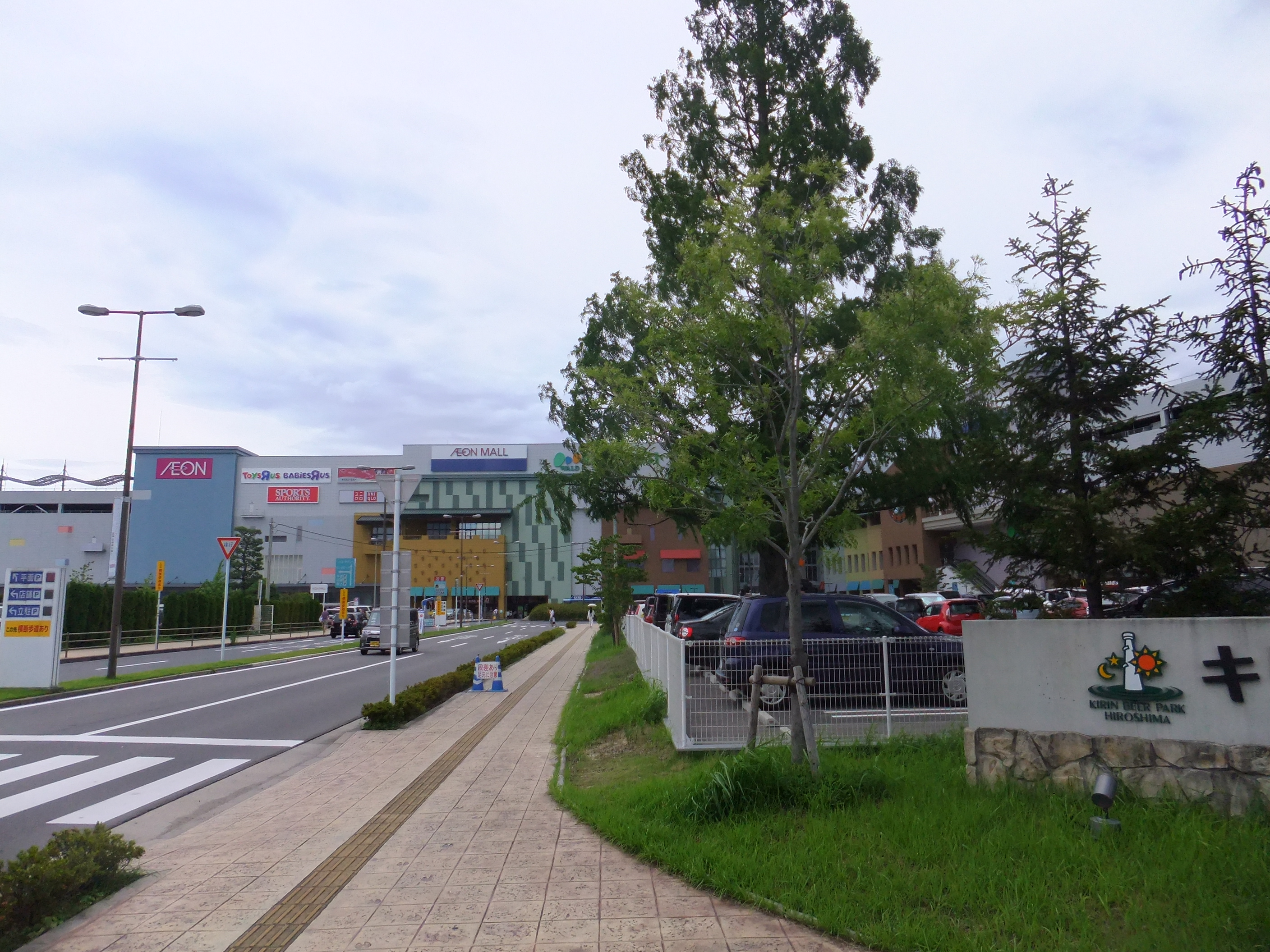 キリンビアパーク広島